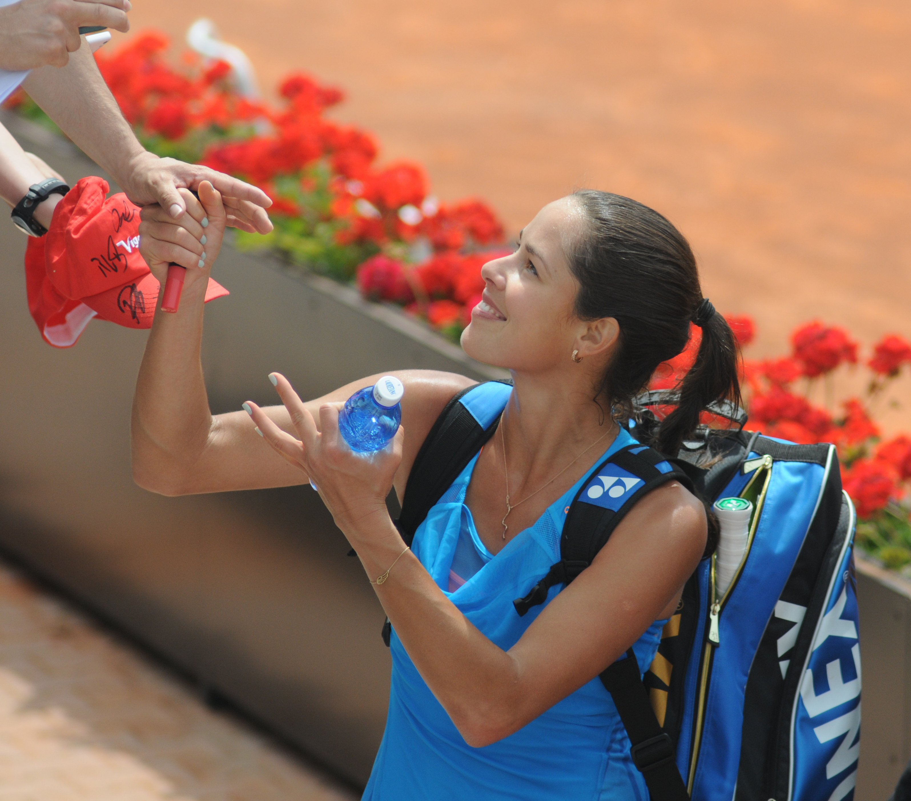 Ana Ivanović at the 2014 Internazionali BNL d'Italia